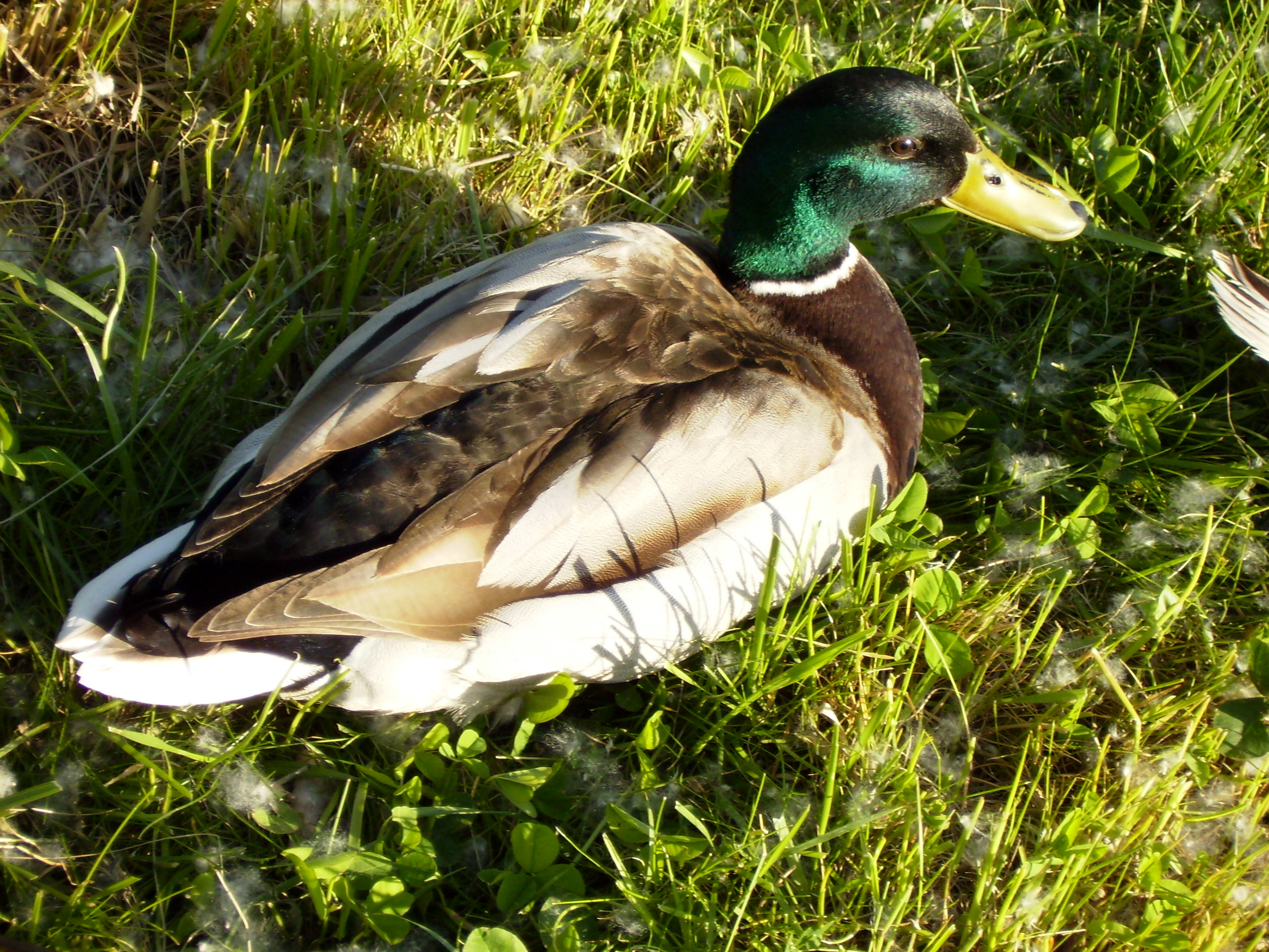 kachna z pražské zoo